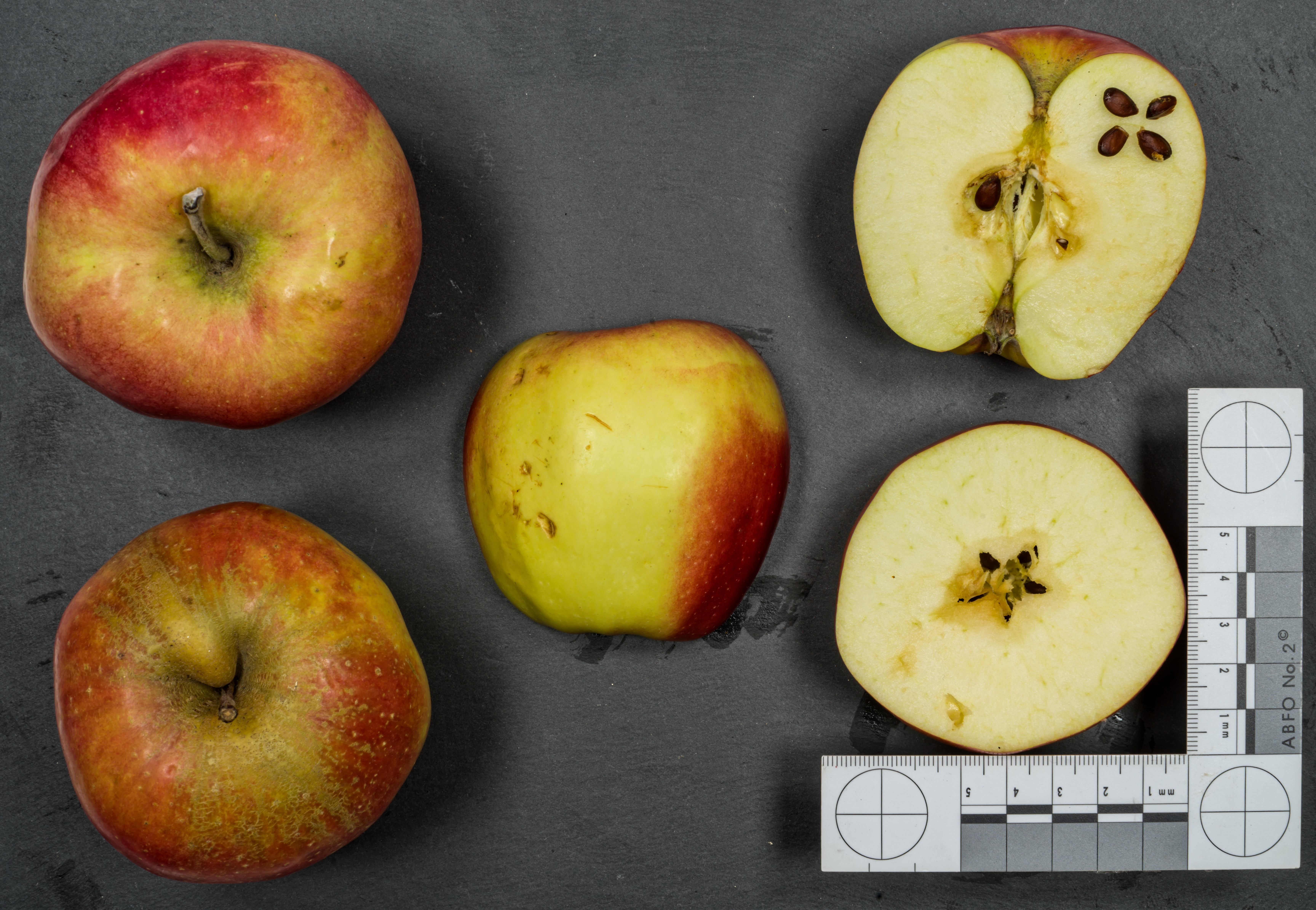 Apfelsorte: Gloster Glockenapfel × Richared Vielen Dank an den Herzapfelhof Lühs in Jork, Altes Land, Deutschland für die freundliche Unterstützung